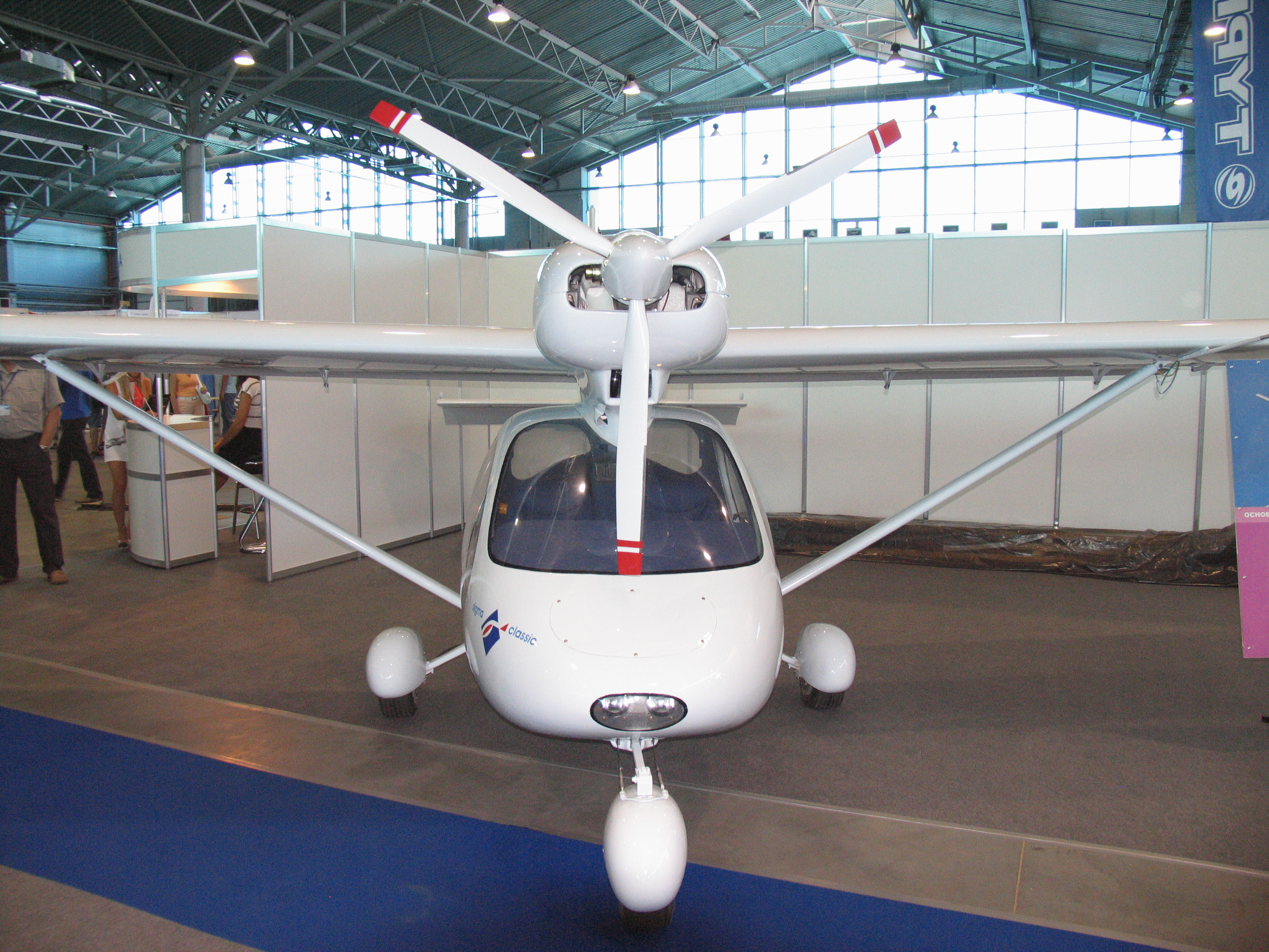 Самолёт «Сигма-классик» на выставке «ИнтерАэроКом 2010» вид спереди.